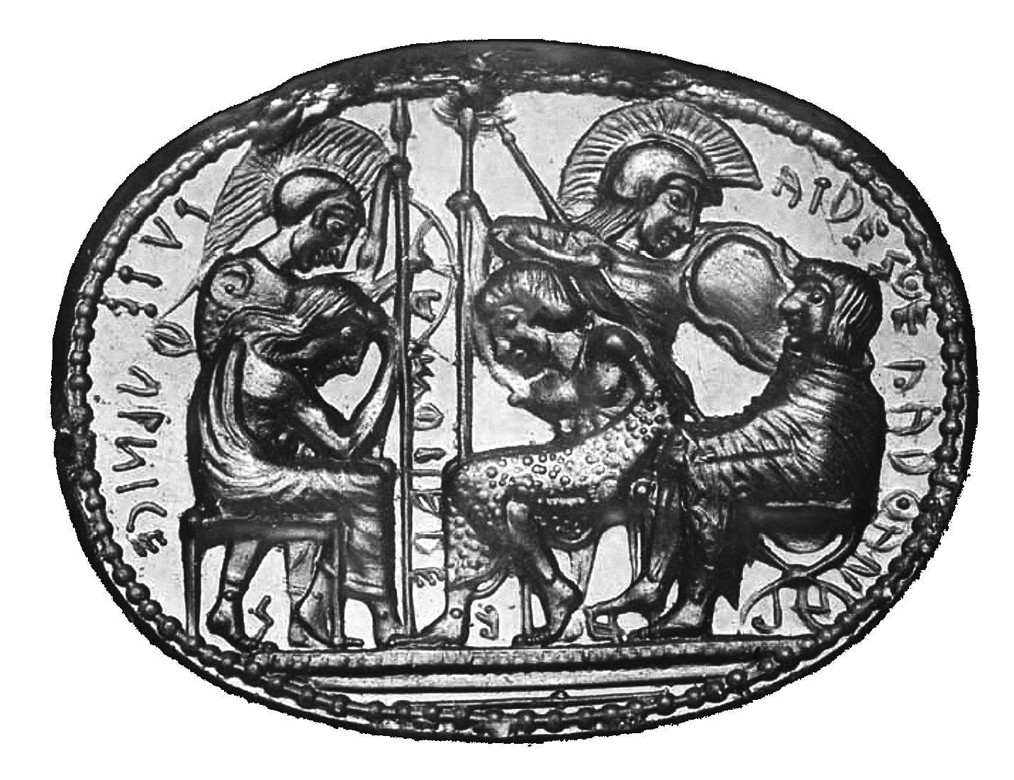 Etruskischer Skarabäus, sog. Stosch'scher SteinSiegelseite: Fünf Helden mit Namensbeischriften aus der Sage "Sieben gegen Theben"Standort: Antikensammlung, Staatliche Museen zu BerlinFundort: Perugia (Italien)Material: KarneolMaße: Länge 1,6 cm; Breite 1,2 cm; Dicke 0,2 – 0,5 cmAbbildung des Abdrucks